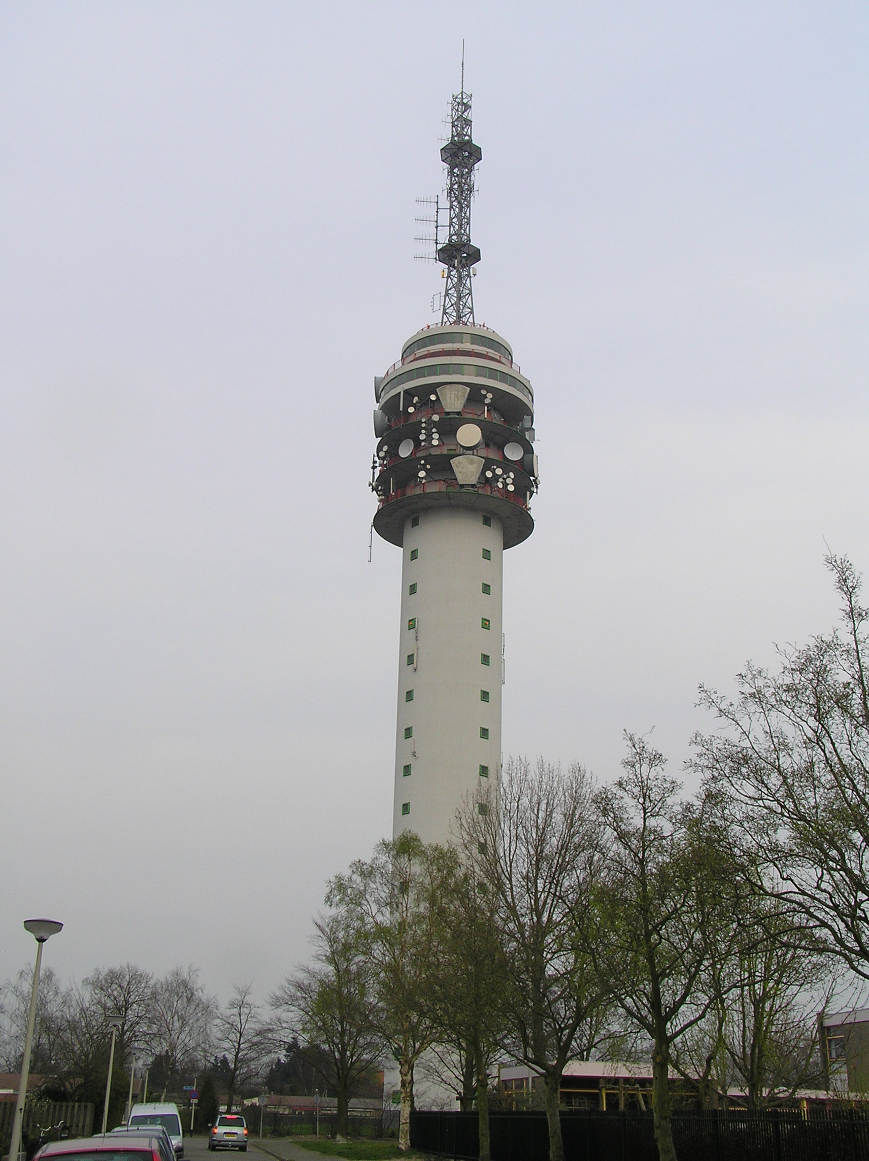 TV-toren Roosendaal (121m)